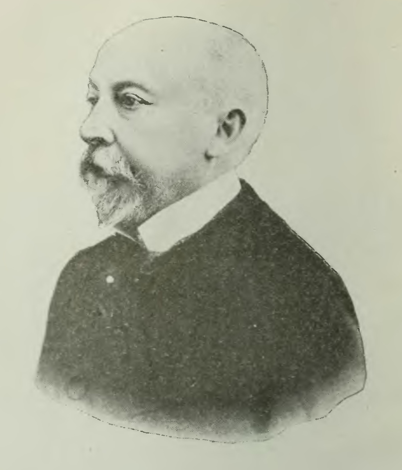 "Notica biogrÃ¤fica del autor": p. [xv]-xxxi